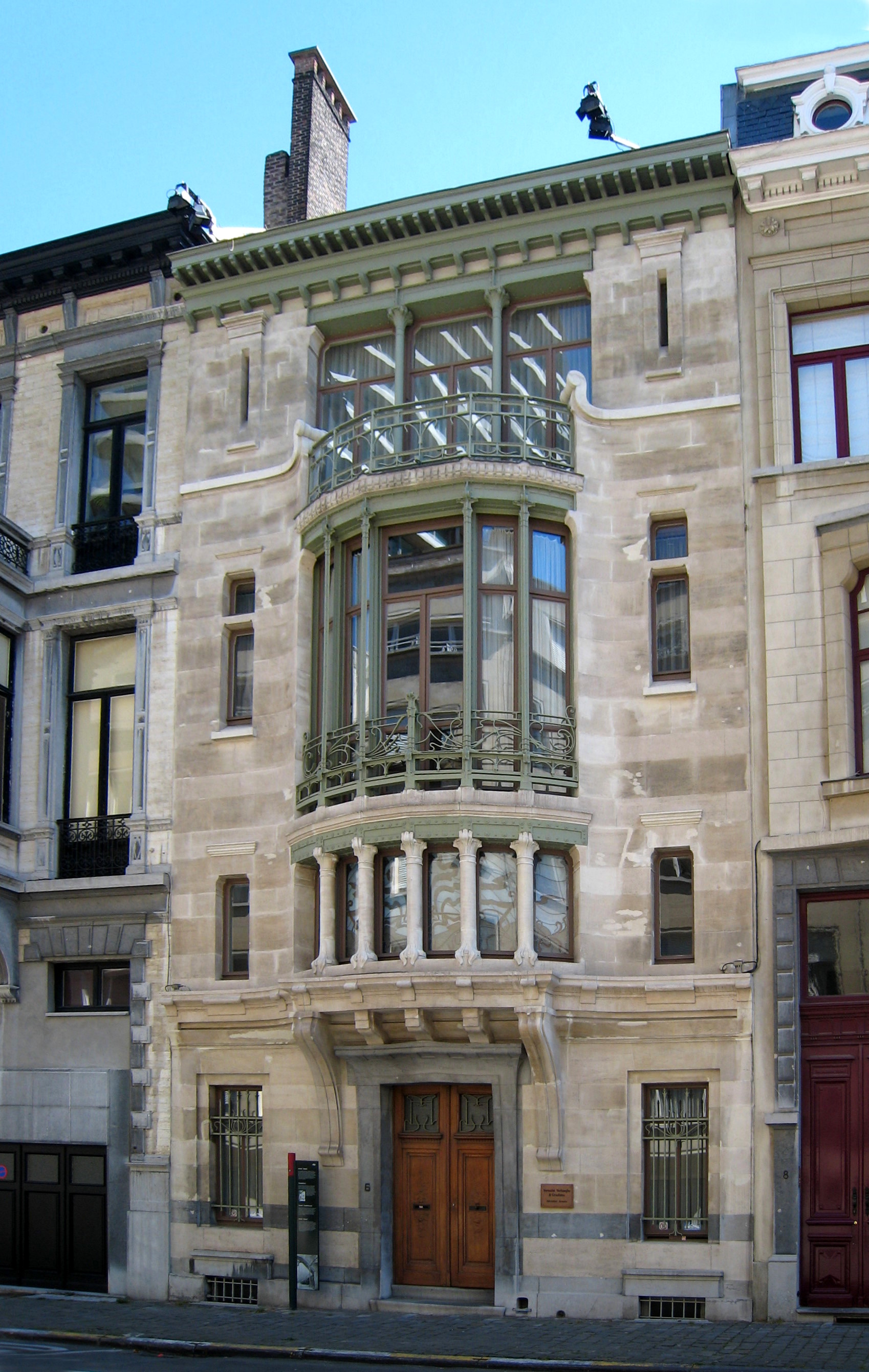 Victor Horta, Hotel Tassel, rue Paul-Emile Janson 6, Ixelles